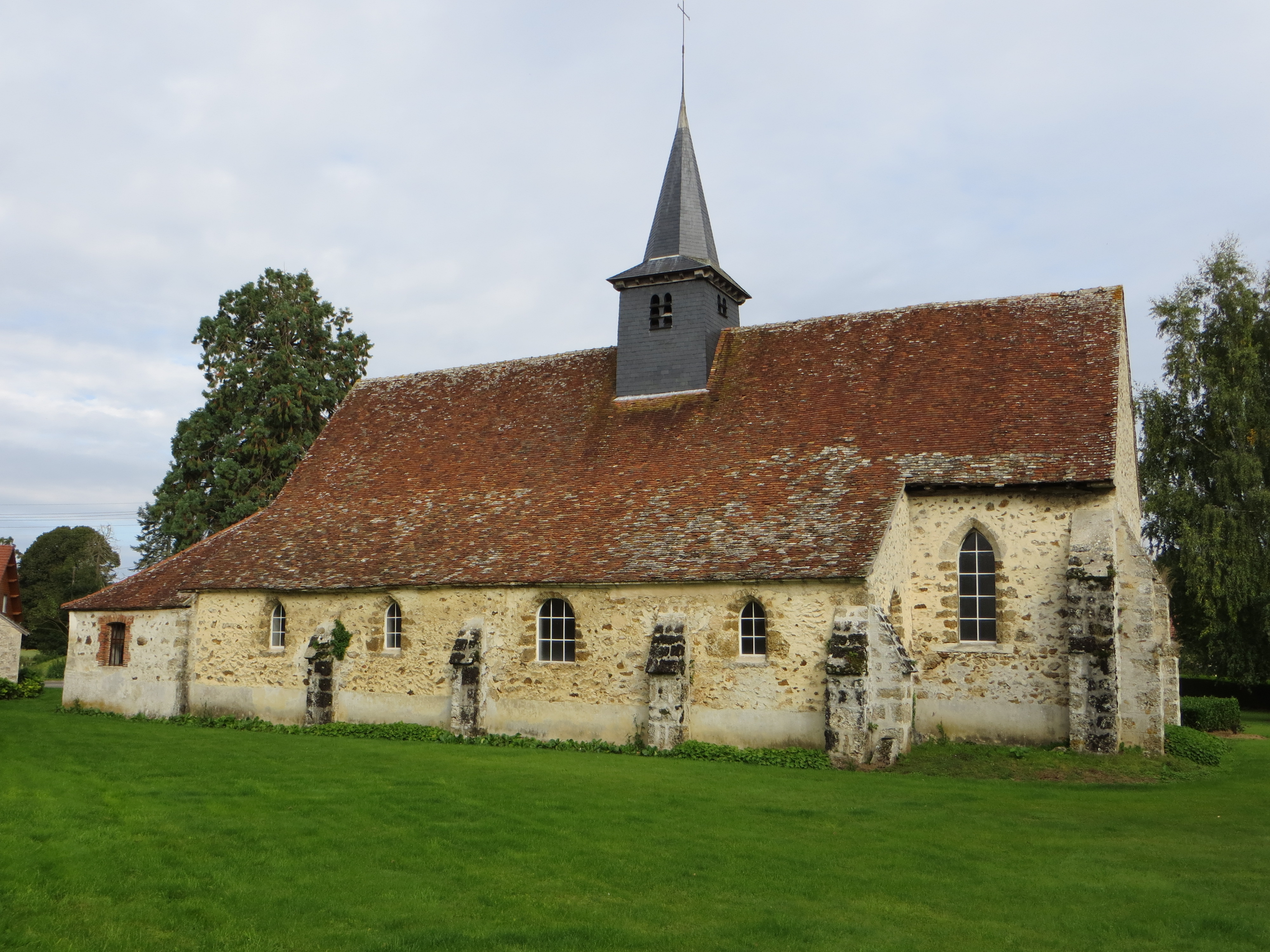 Vue générale de l'église